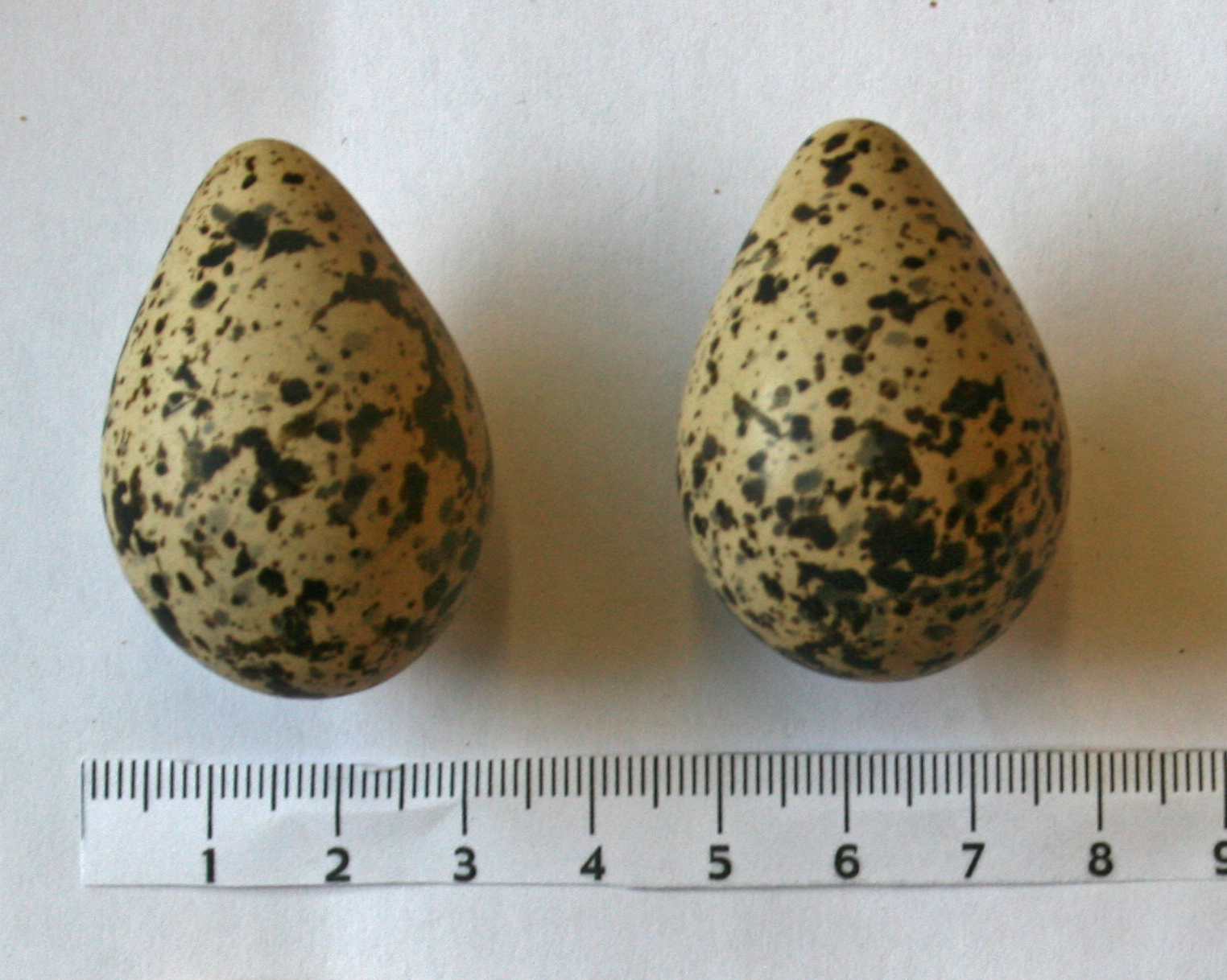 Punajalkaviklon munat.